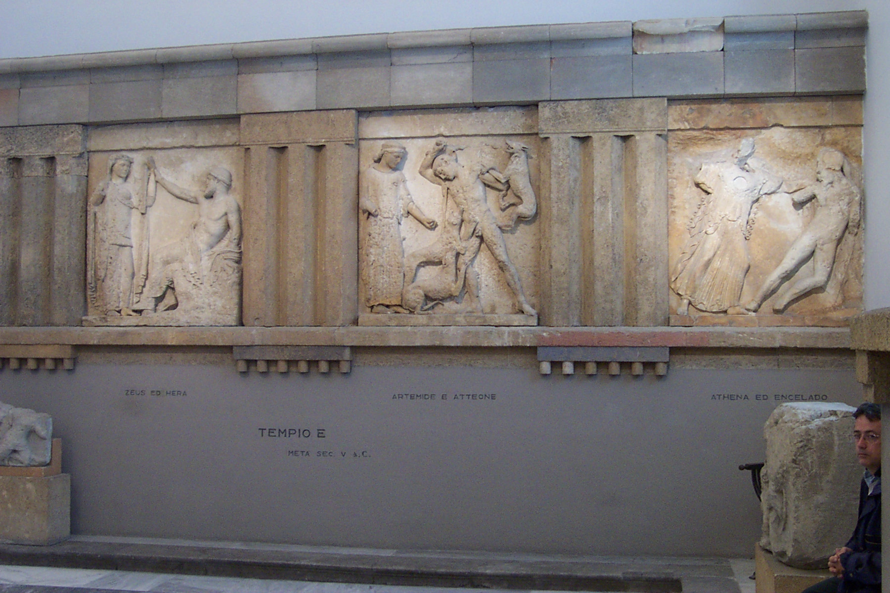 Fregio dal tempio E di Selinunte, oggi al Museo archeologico regionale di Palermo. Eigen foto. mei 2003